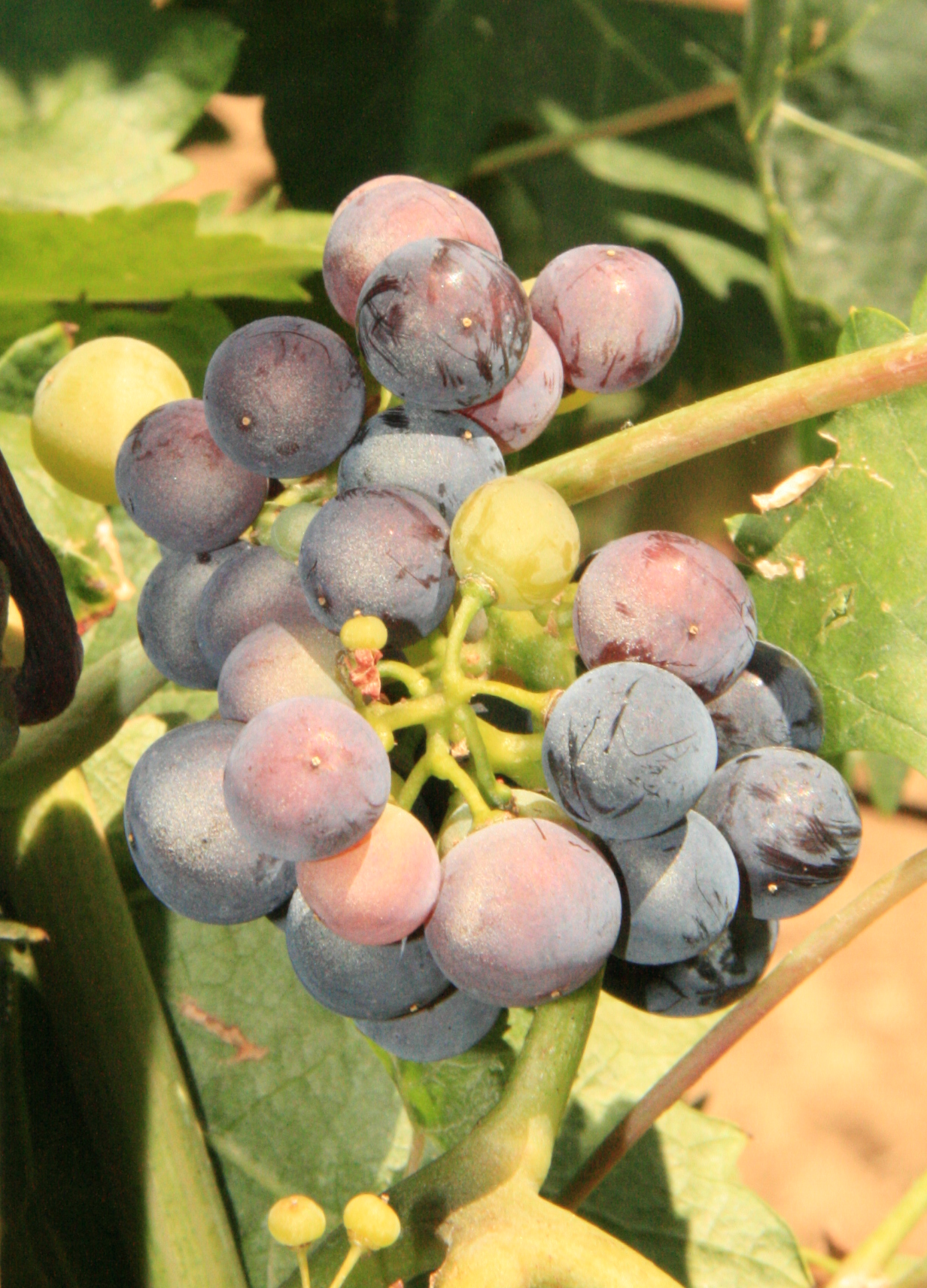 Uva vina de Toro a mediados de agosto en los viñedos de la bodega Valbusenda